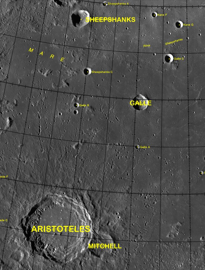 Cráter lunar Galle. Localización. (Imagen LRO)